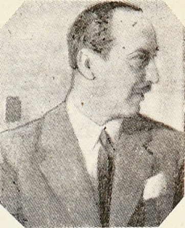 Rafael Frontaura de la Fuente ( Valparaíso, 7 de febrero de 1896 - Santiago (Chile), 15 de agosto de 1966) fue un actor chileno.